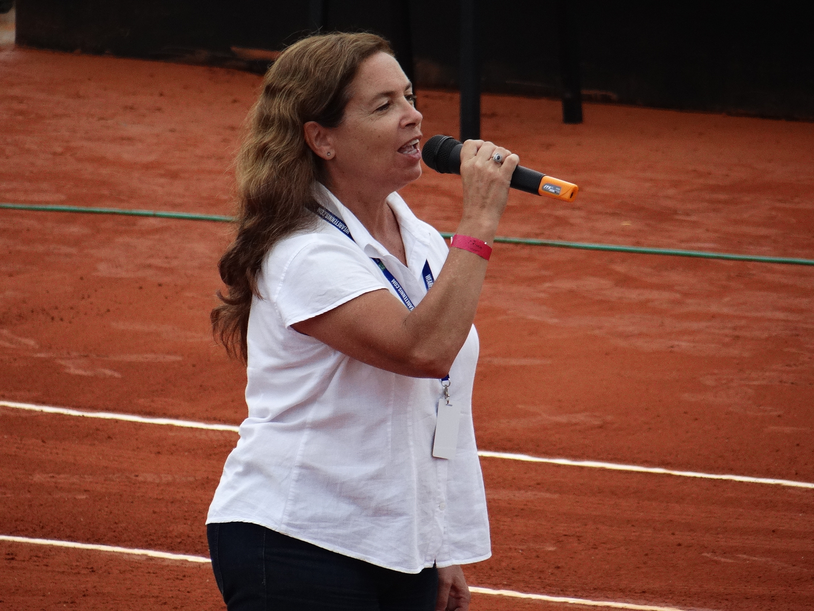 Sandra Mihanovich cantando el Himno Nacional Argentino en la ceremonia de apertura de la serie Argentina-Japón